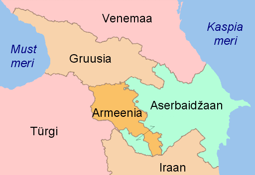 Taga-Kaukaasia kaart.